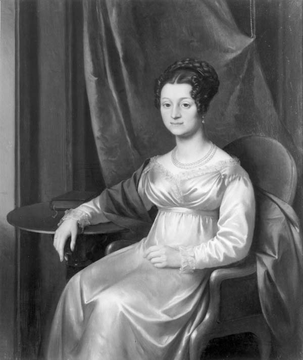 Portret van Susanna Amelia Testas